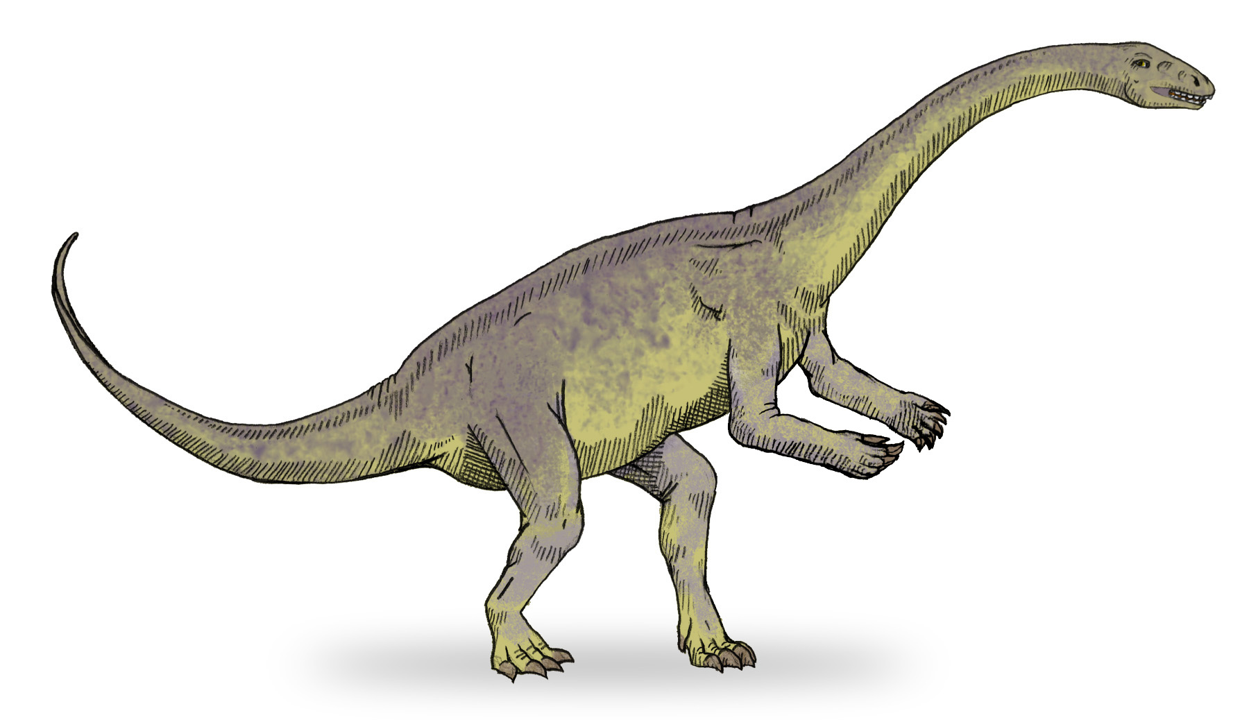 by me user debivort, 1.07